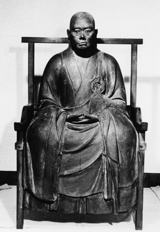 Mugai Nyodai (kin.: 無外 如大 1223-1298)